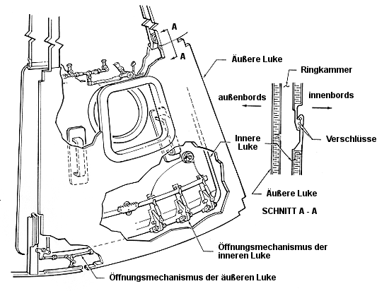 Apollo 1 - Skizze der inneren und äußeren Lukenkonstruktion